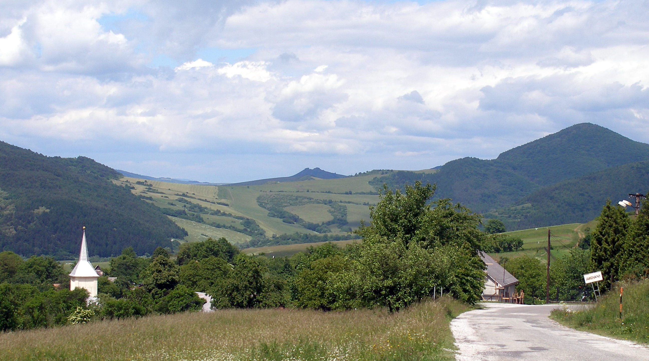 Obec Jakovany okres Sabinov.